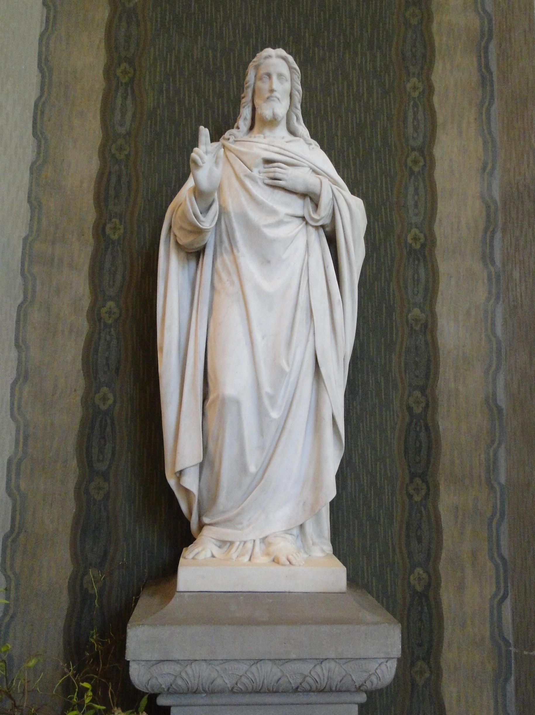 Figur des segnenden Christus von Johannes Schilling in der Christuskirche Dresden-Klotzsche